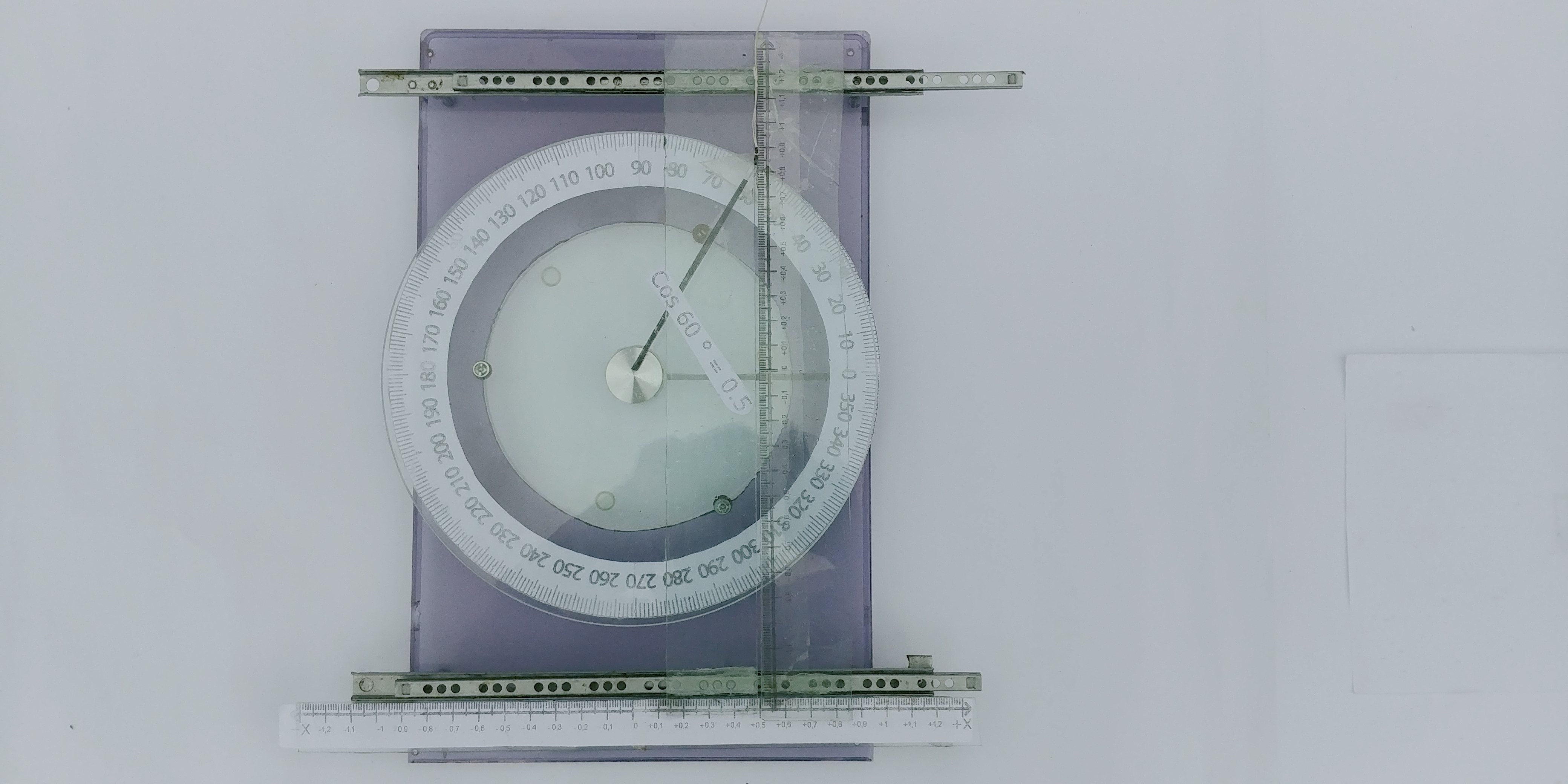 Транспортир з метричними шкалами градусів та двомірними шкалами XY